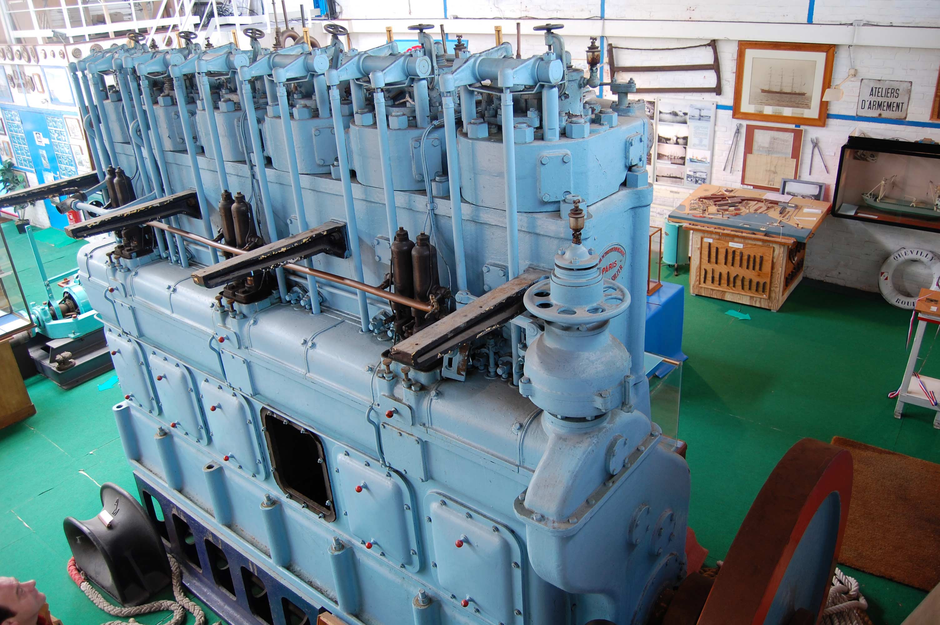 Moteur Sulzer 6kd31 (1937) qui était installé sur un chalutier hauturier : puissance 400 CV, poids 26 tonnes, hauteur : 3,05 m, longueur 4 m 90 avec le volant; photographié au musée maritime et fluvial de Rouen